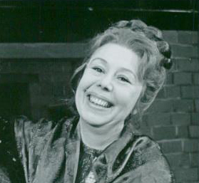 Ann Mari Ström.